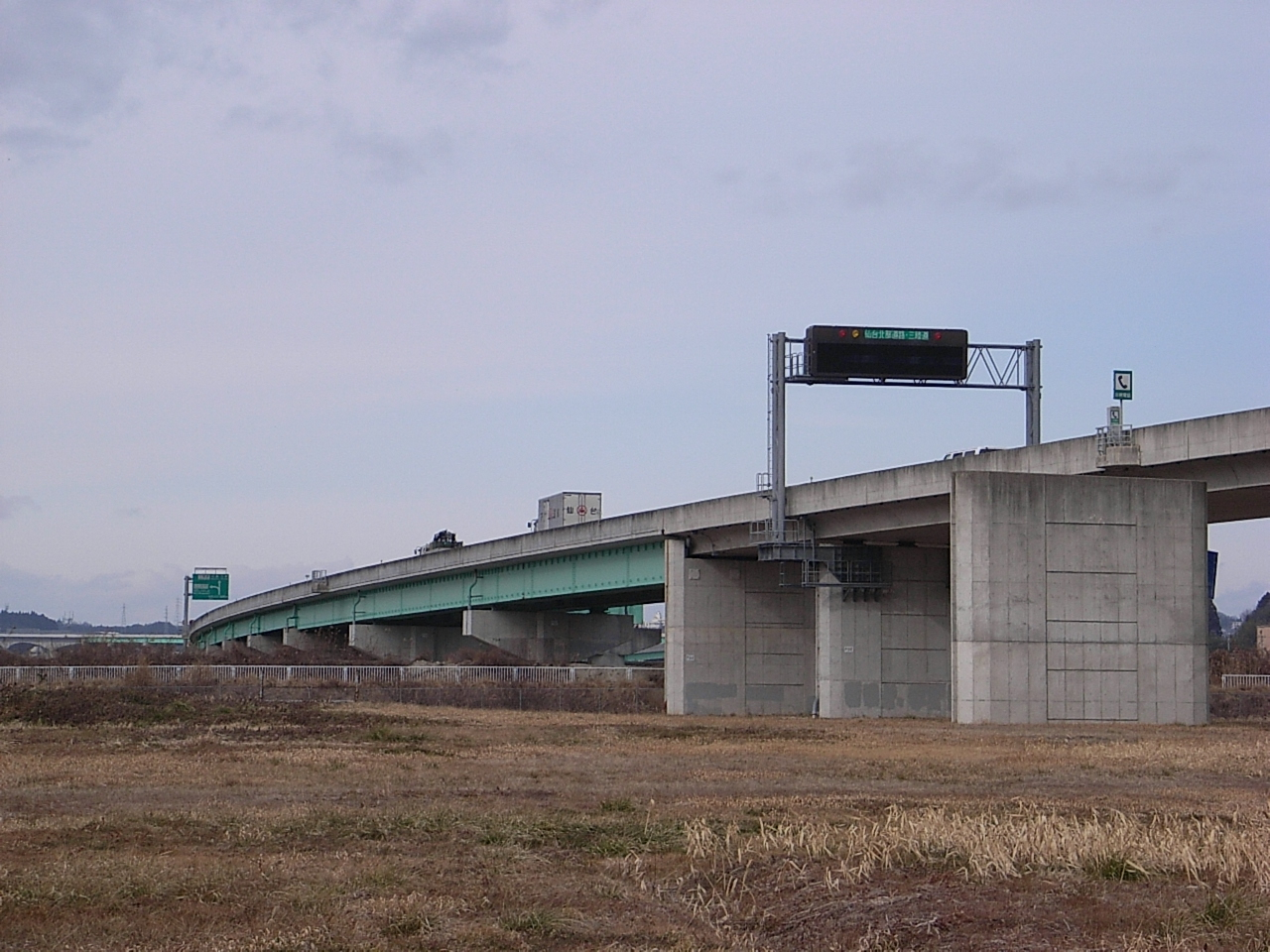 Sanriku Expressway. Tagajō, Miyagi prefecture, Japan.